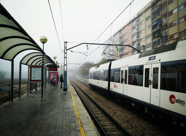 Metro.